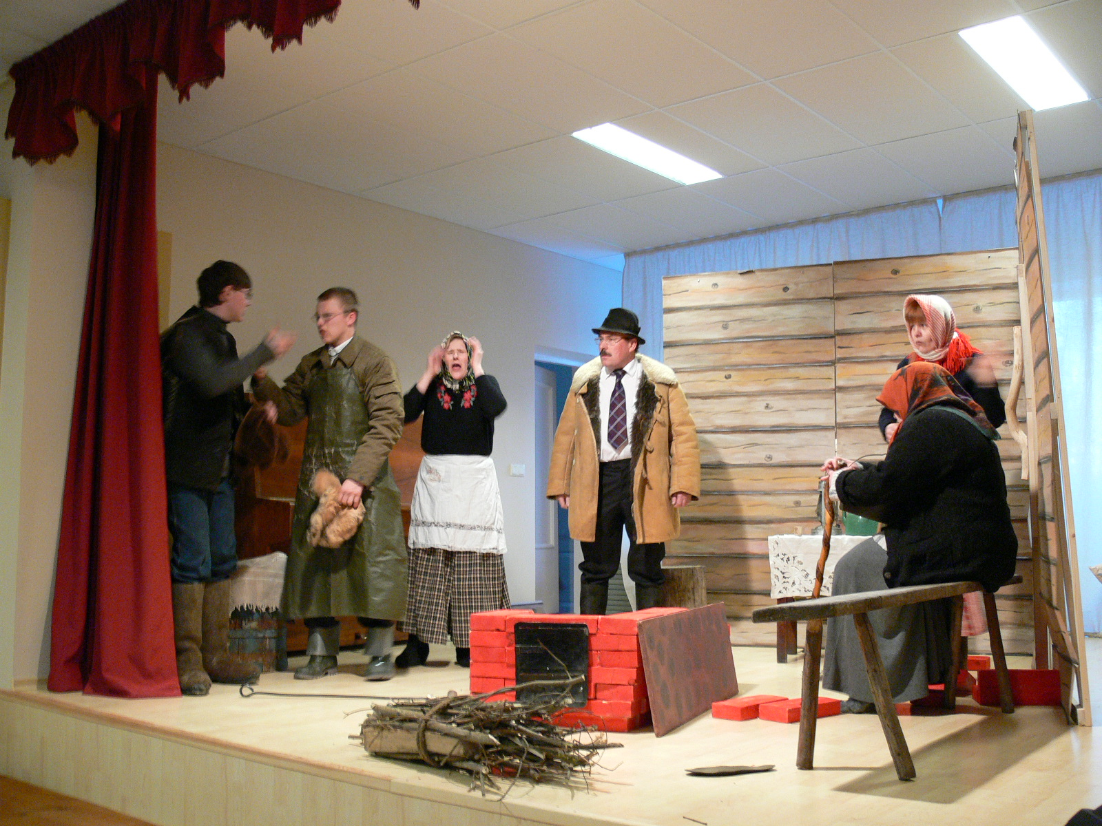 Fotol vasakult: Jörgen Štubis, Ivar Rosenberg, Airika Saamo, Aivar Rosenberg, Maret Soon, istub Iines Urm